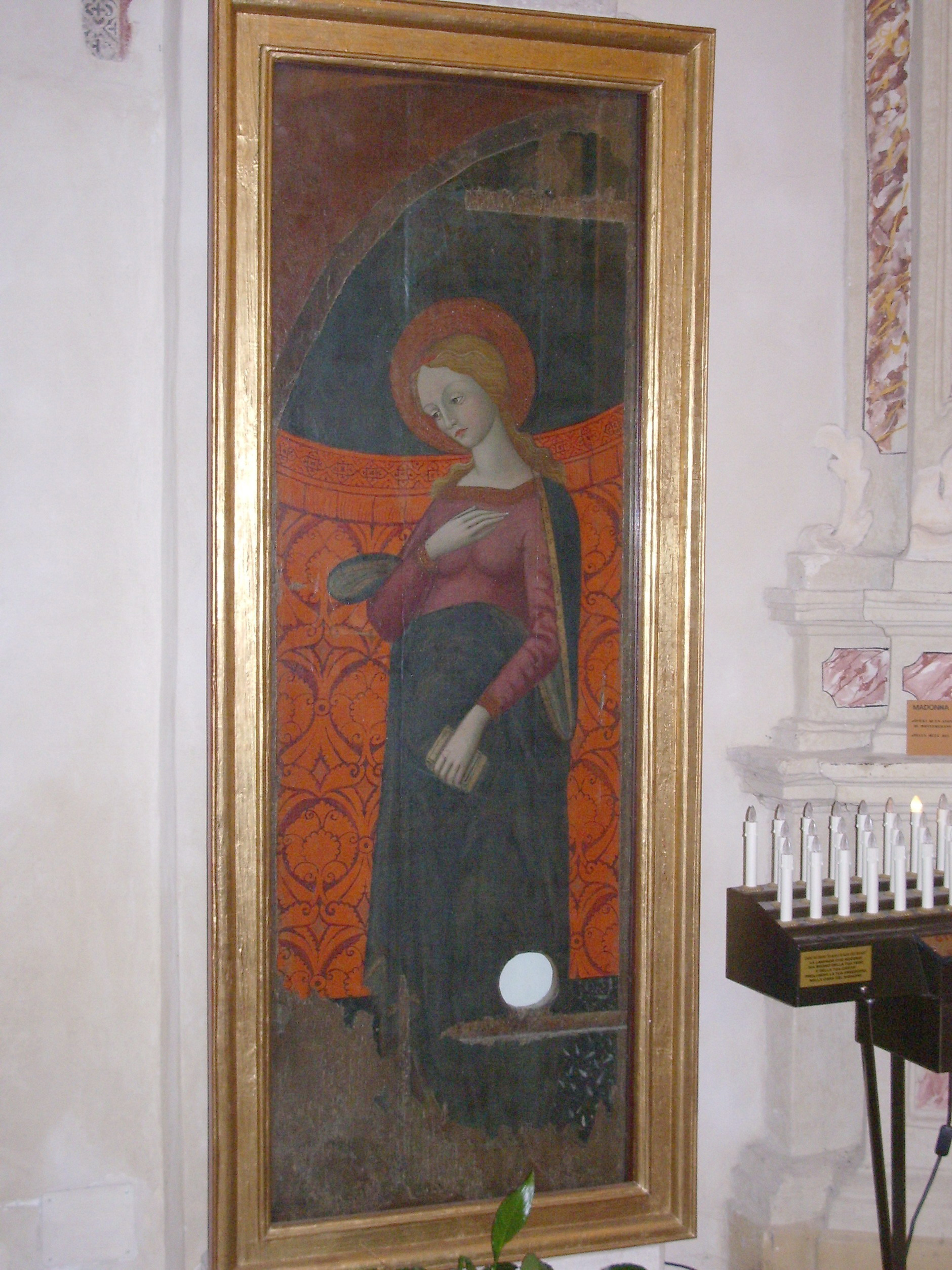 La Madonna della Gattaiola (XV sec.) nella chiesa di San Giorgio a Montemerano (GR)